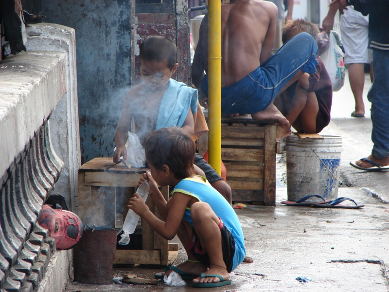 Street children in Cebu (Philippines).